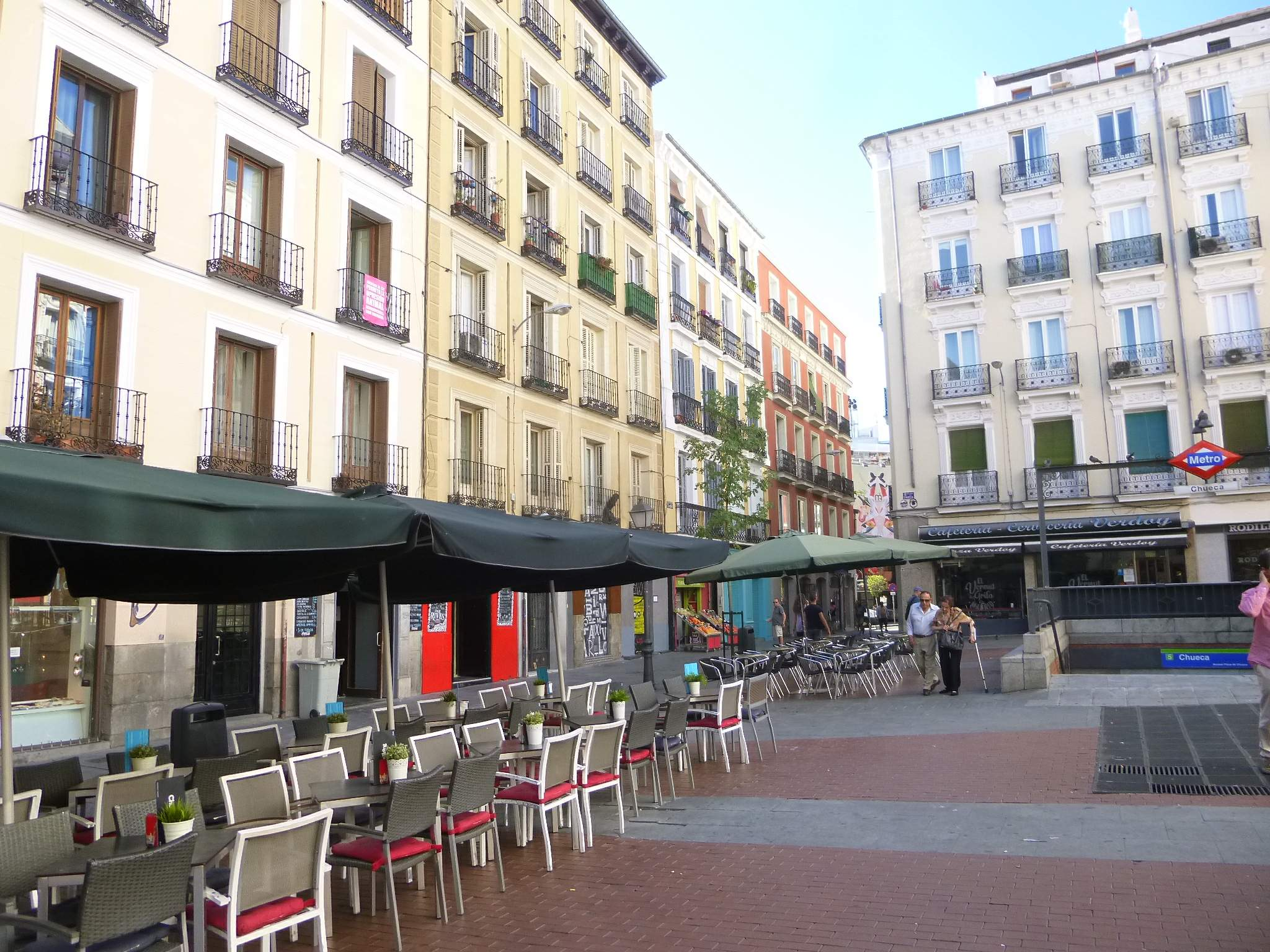 Madrid - Plaza de Chueca